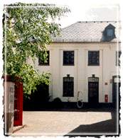 Alte Synagoge Boppard